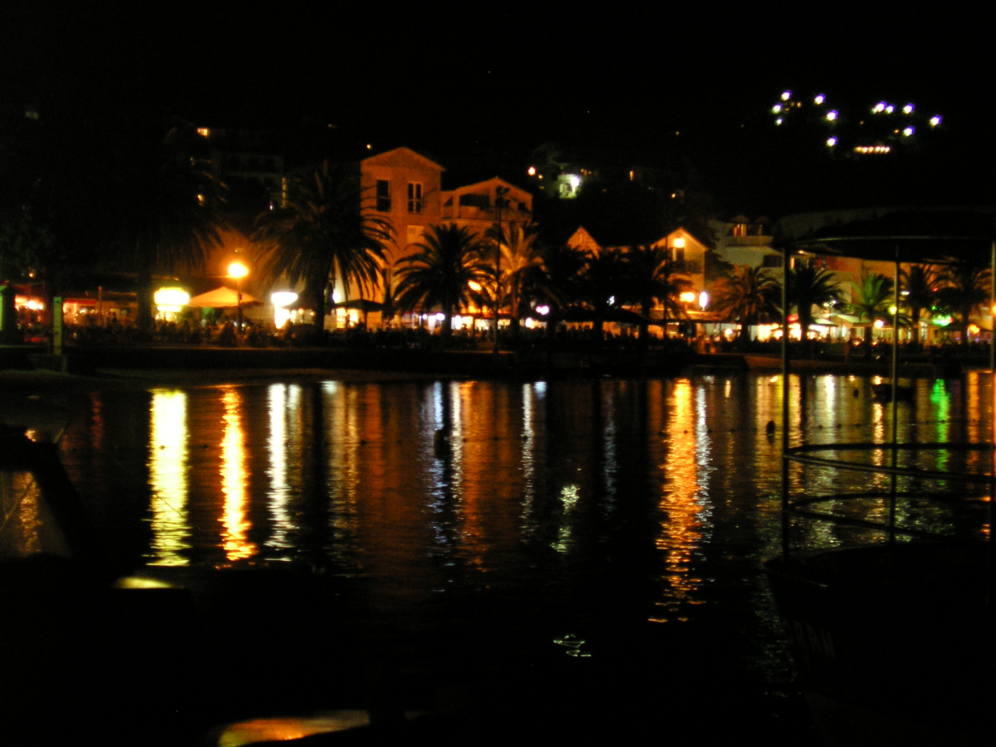 Noční Gradac, foceno z přístavu.